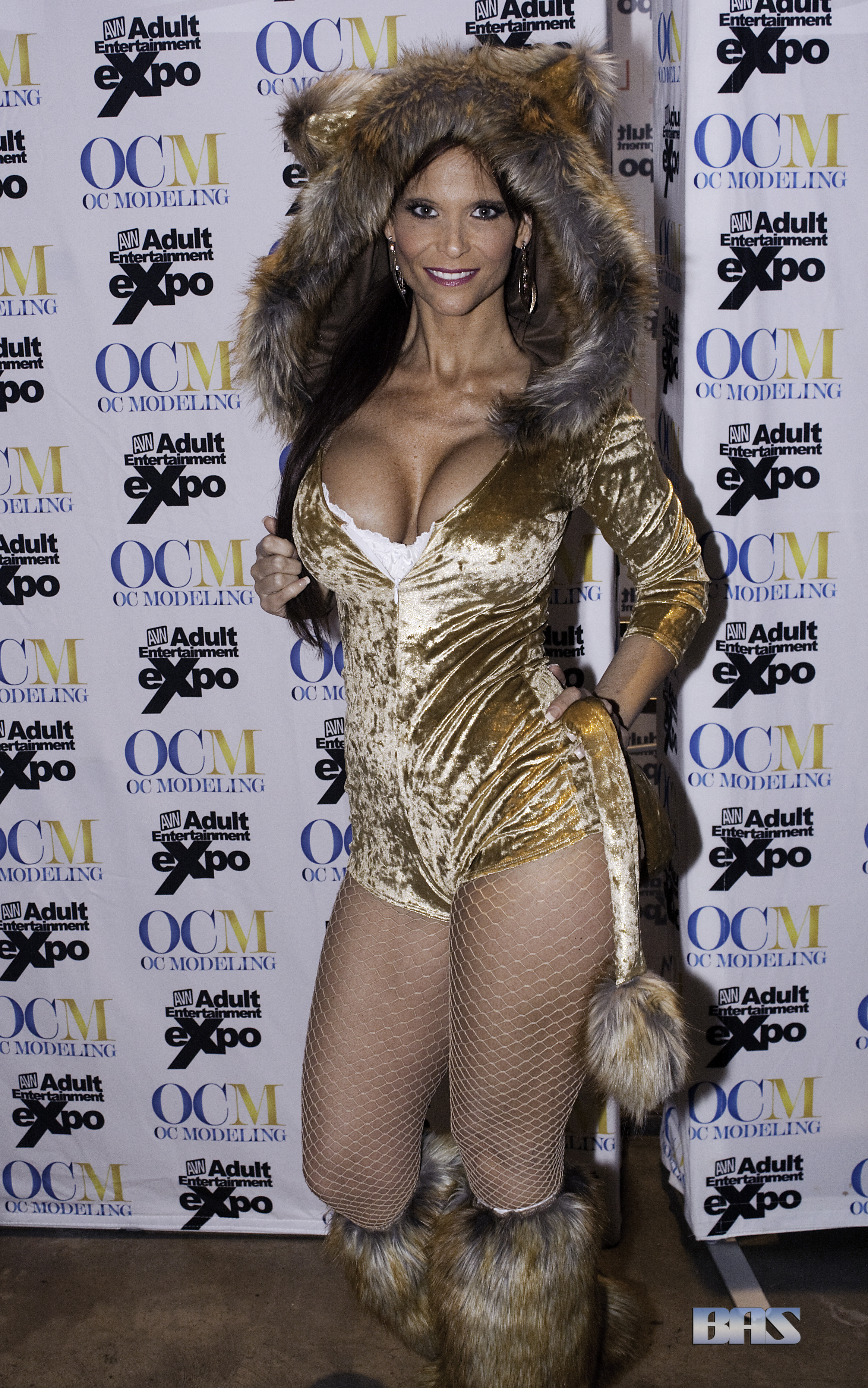 AEE16_0618bas